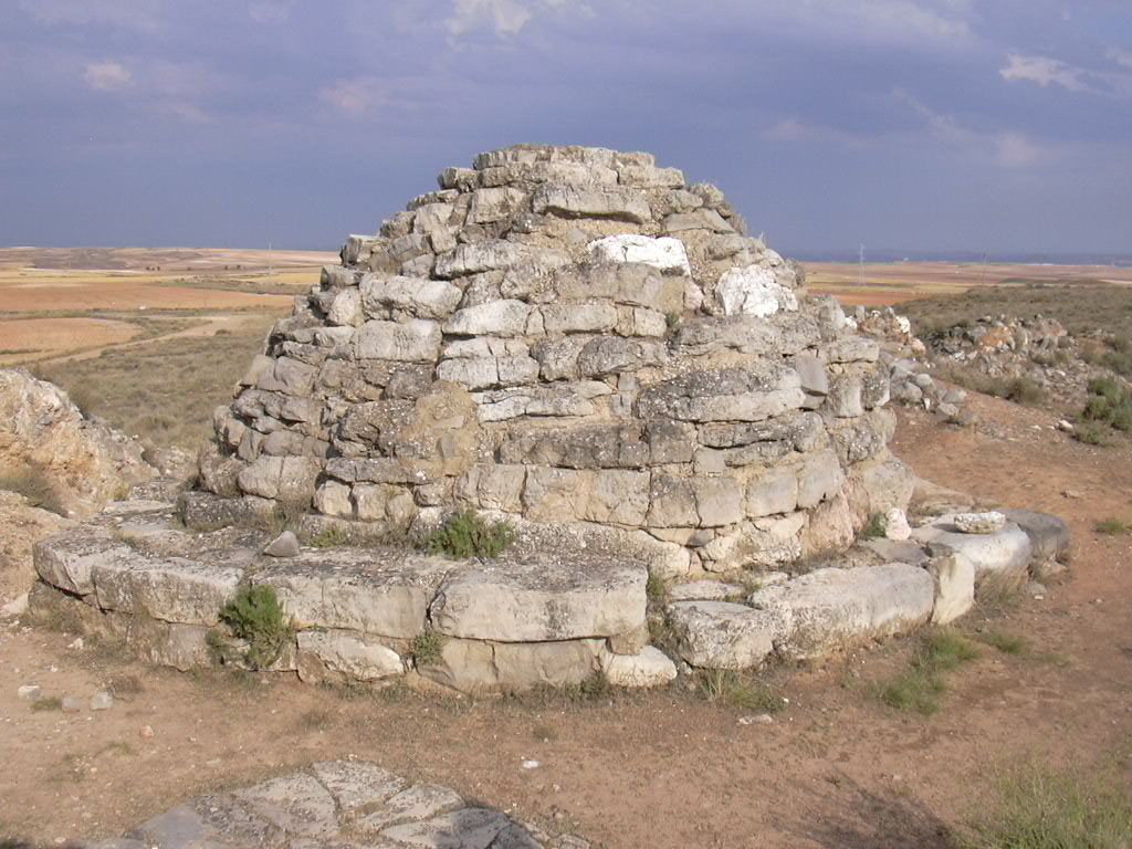 Tumba íbera de Azaila